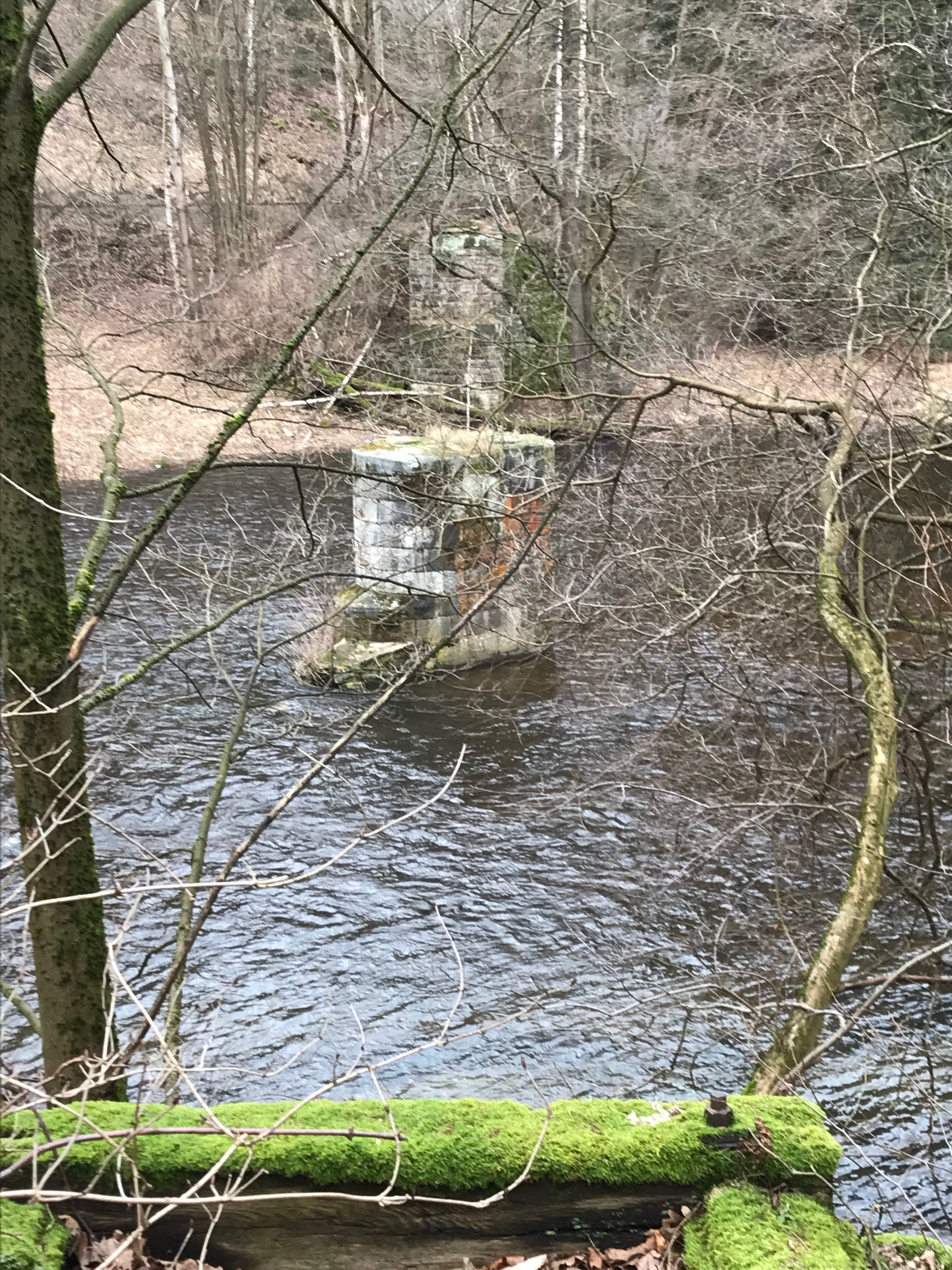 Mittelpfeiler und Brückenlager der Flöhabrücke